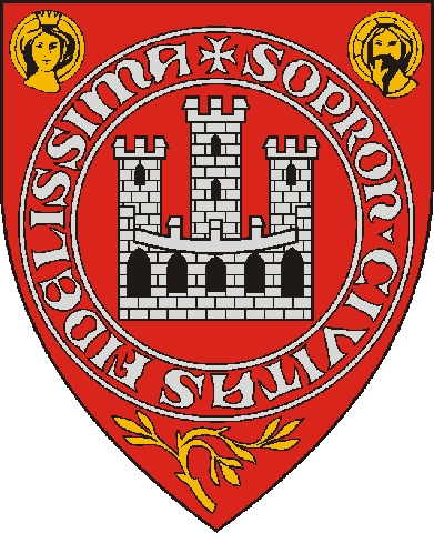 Sopron címere